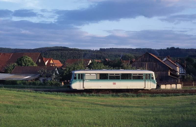 771 041 am 23.05.98 in Rappelsdorf